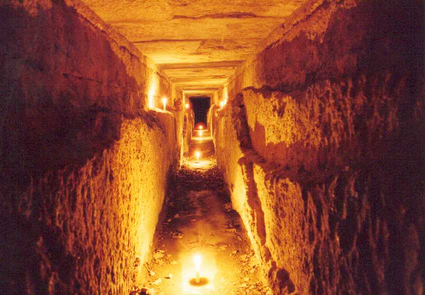 À l'intérieur du pont du Gard. Photo en pause longue (30s) au grand angle (28mm) éclairage bougies.